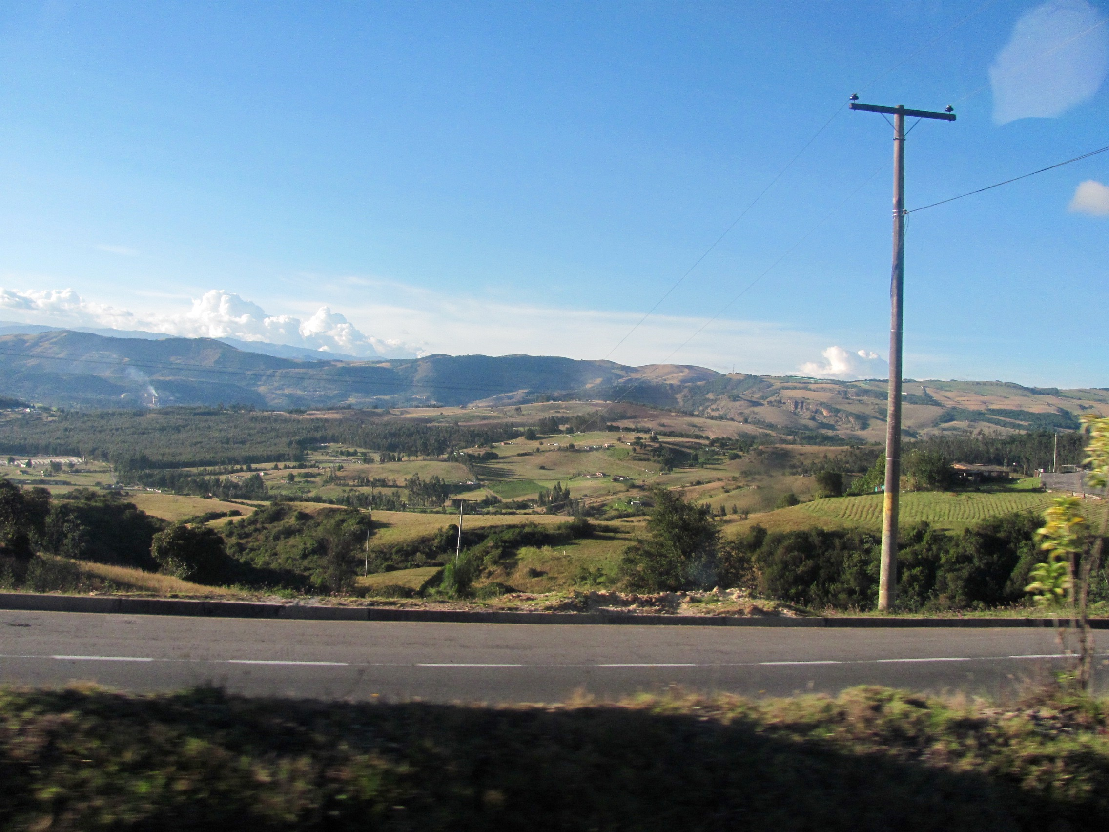 Esta fotografía fue tomada en el municipio colombiano con código 25183.